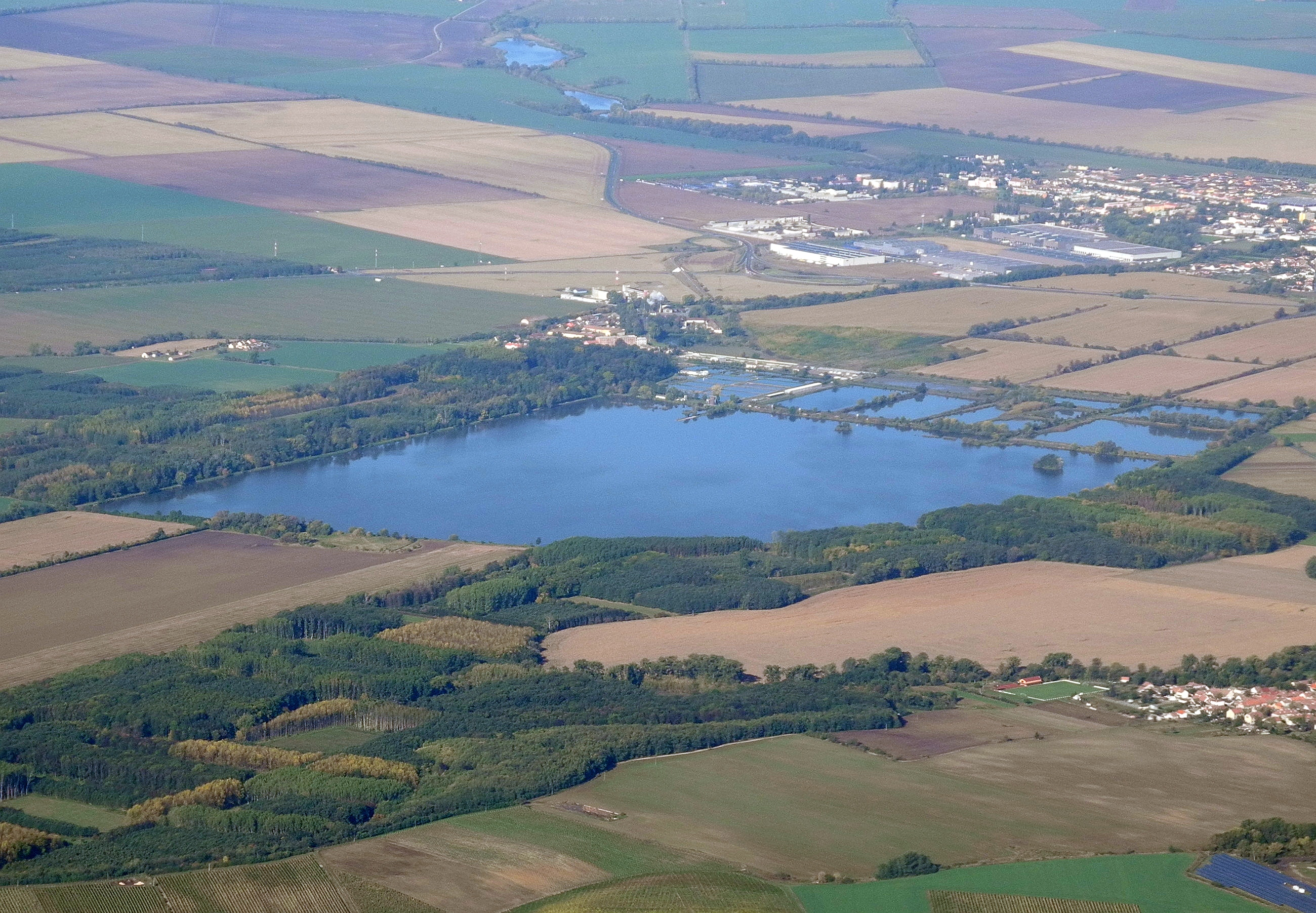 Starý rybník u Pohořelic.